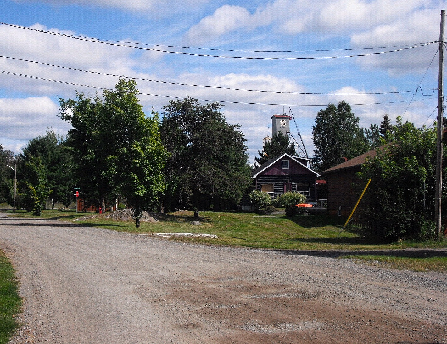 Vue sur une partie de l'ancien village minier de Bourlamaque, à Val d'Or, Québec, Canada.